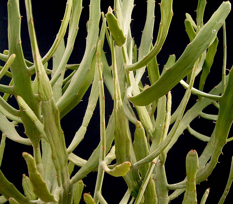 Euphorbia enterophora ssp. enterophora